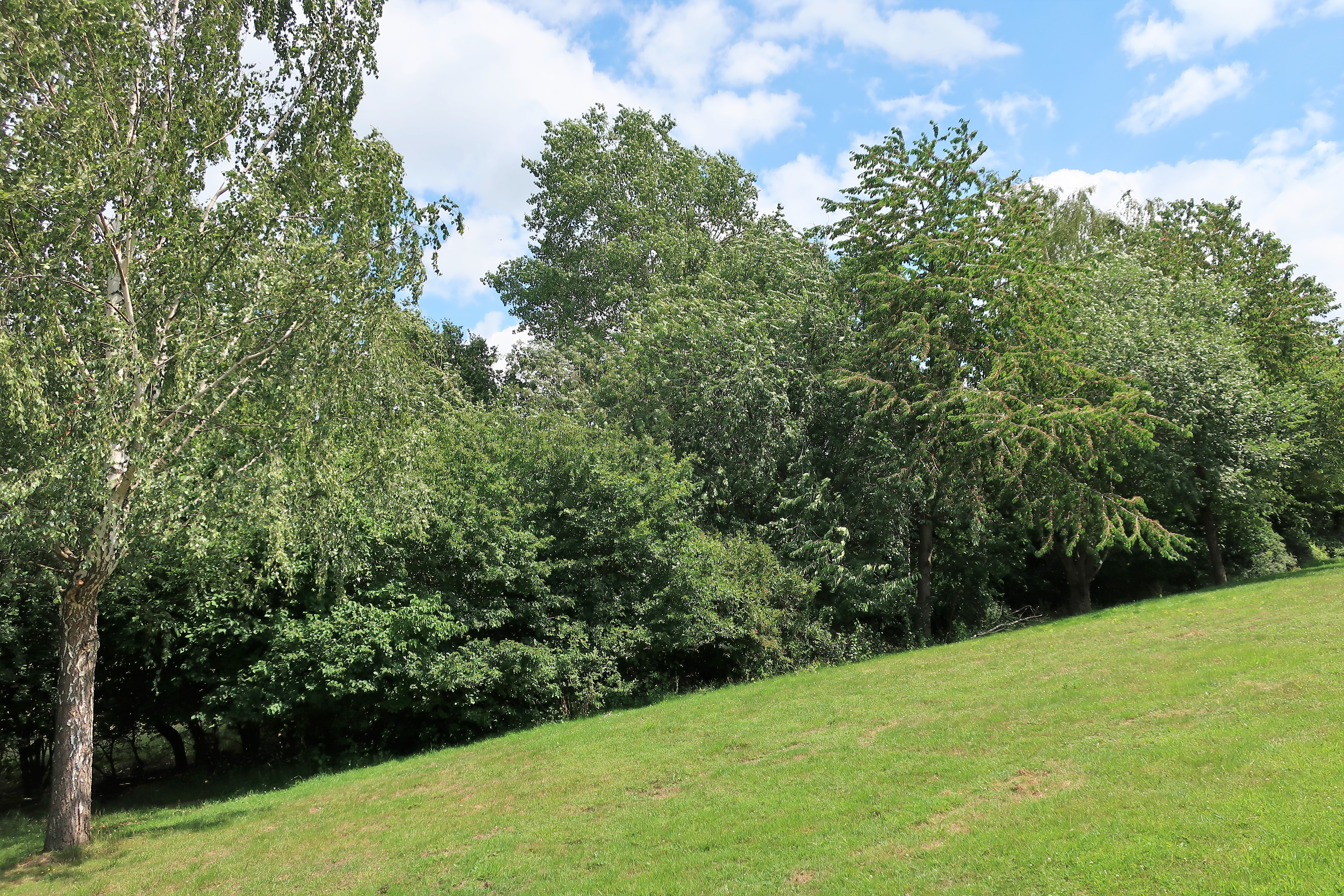 Geschützter Landschaftsbestandteil 1.4.2.42 „Quellbereich Kronocken“ in Hagen-Hohenlimburg, Neuer Kronocken. Es handelt sich um einen Quellbereich südöstlich von Henkhausen nordöstlich der Alten Heerstraße.